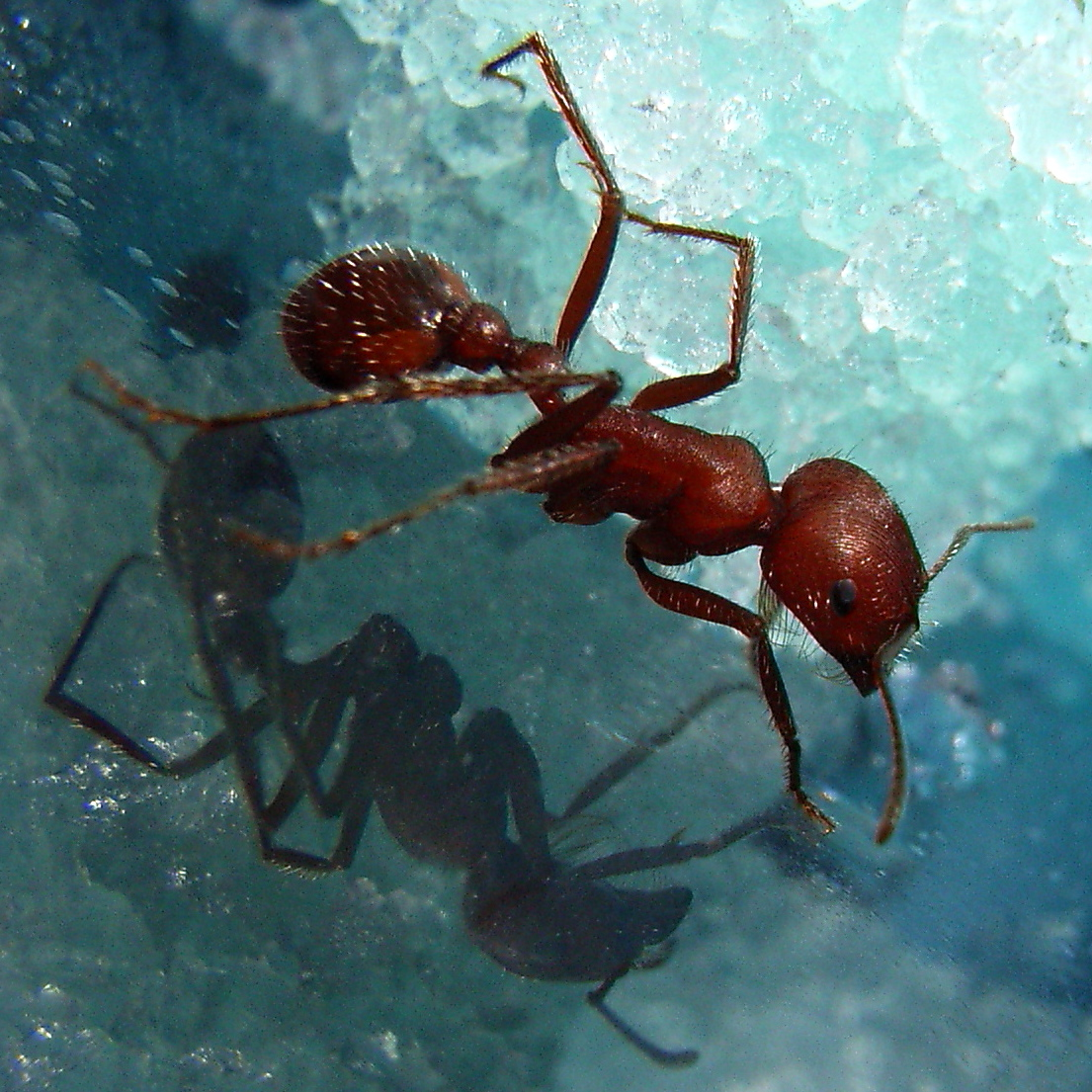 Ant